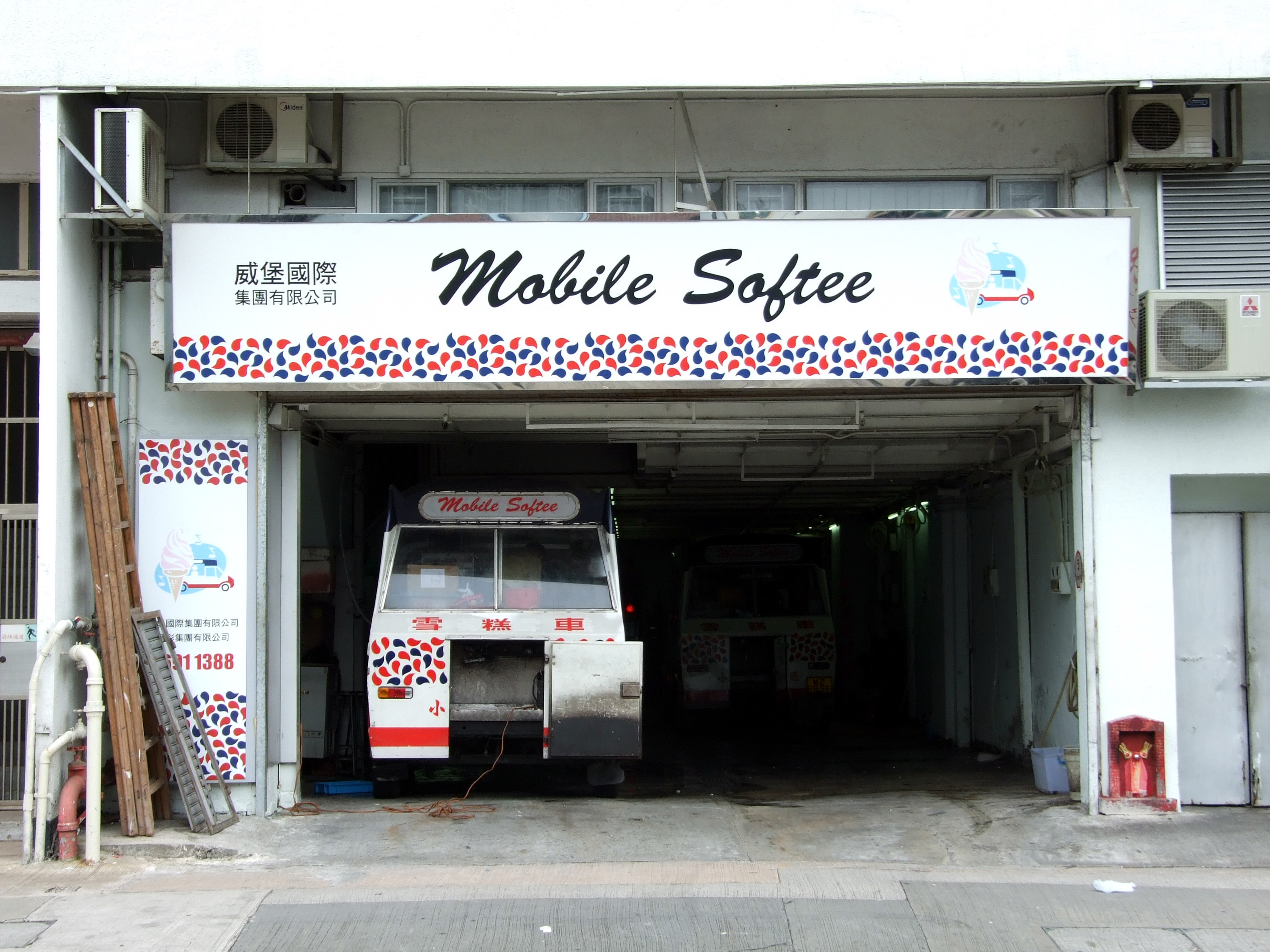 中文（香港）: 富豪雪糕火炭總部